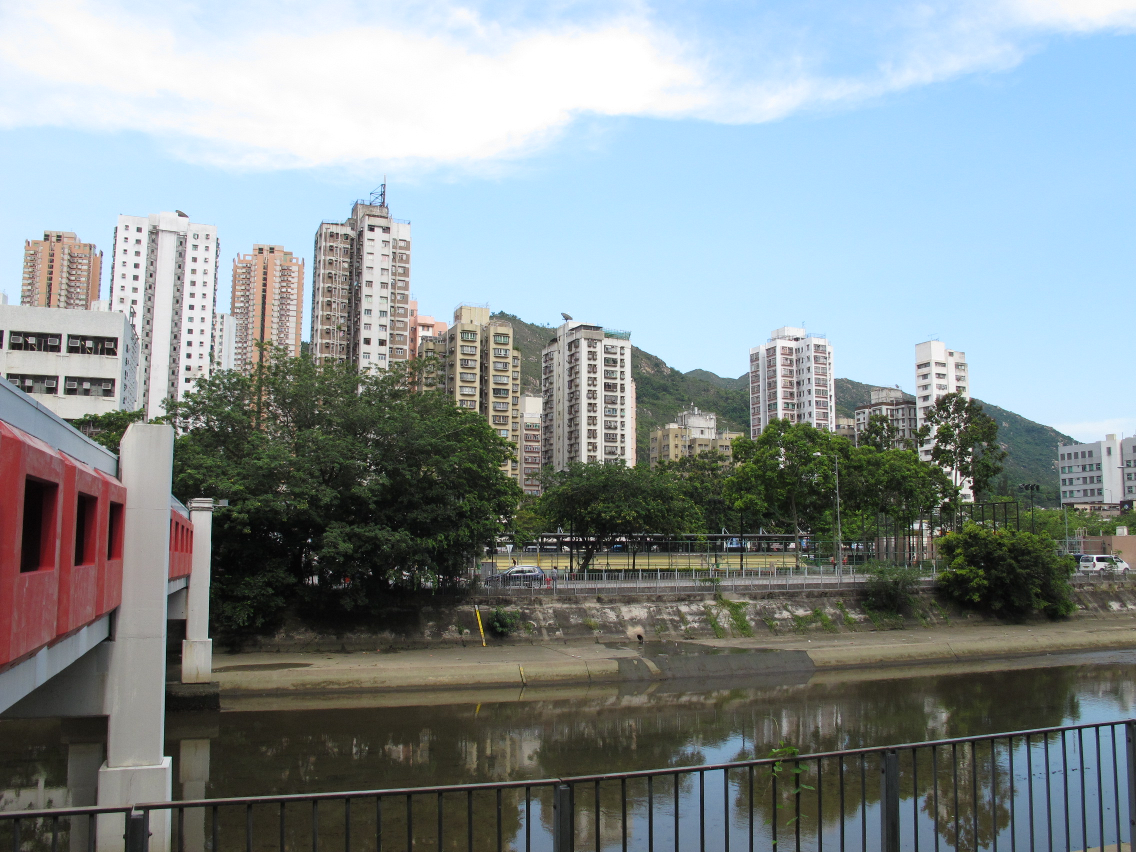 Tuen Mun Hung Kiu 紅橋